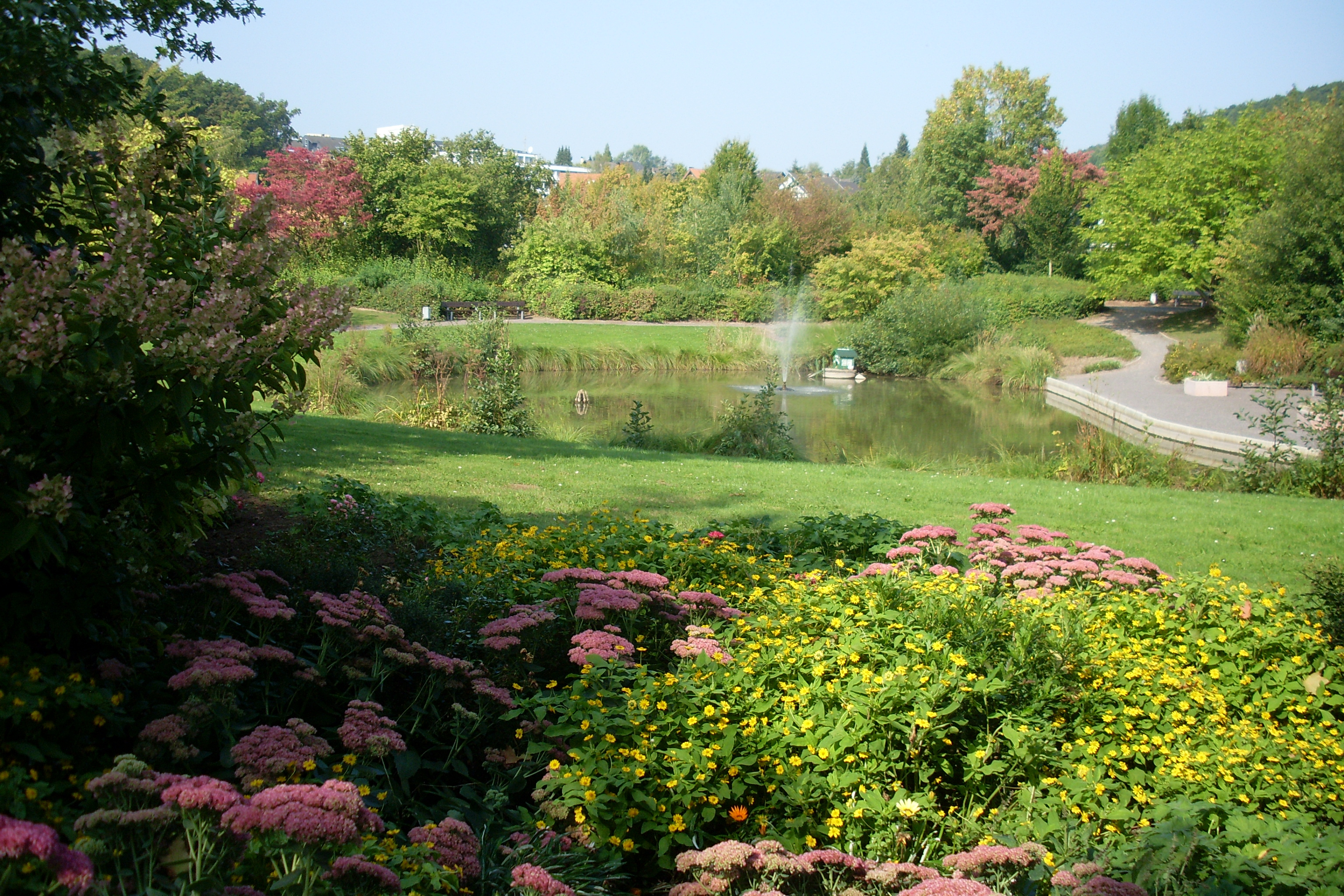 Kurpark, nördlicher Teil